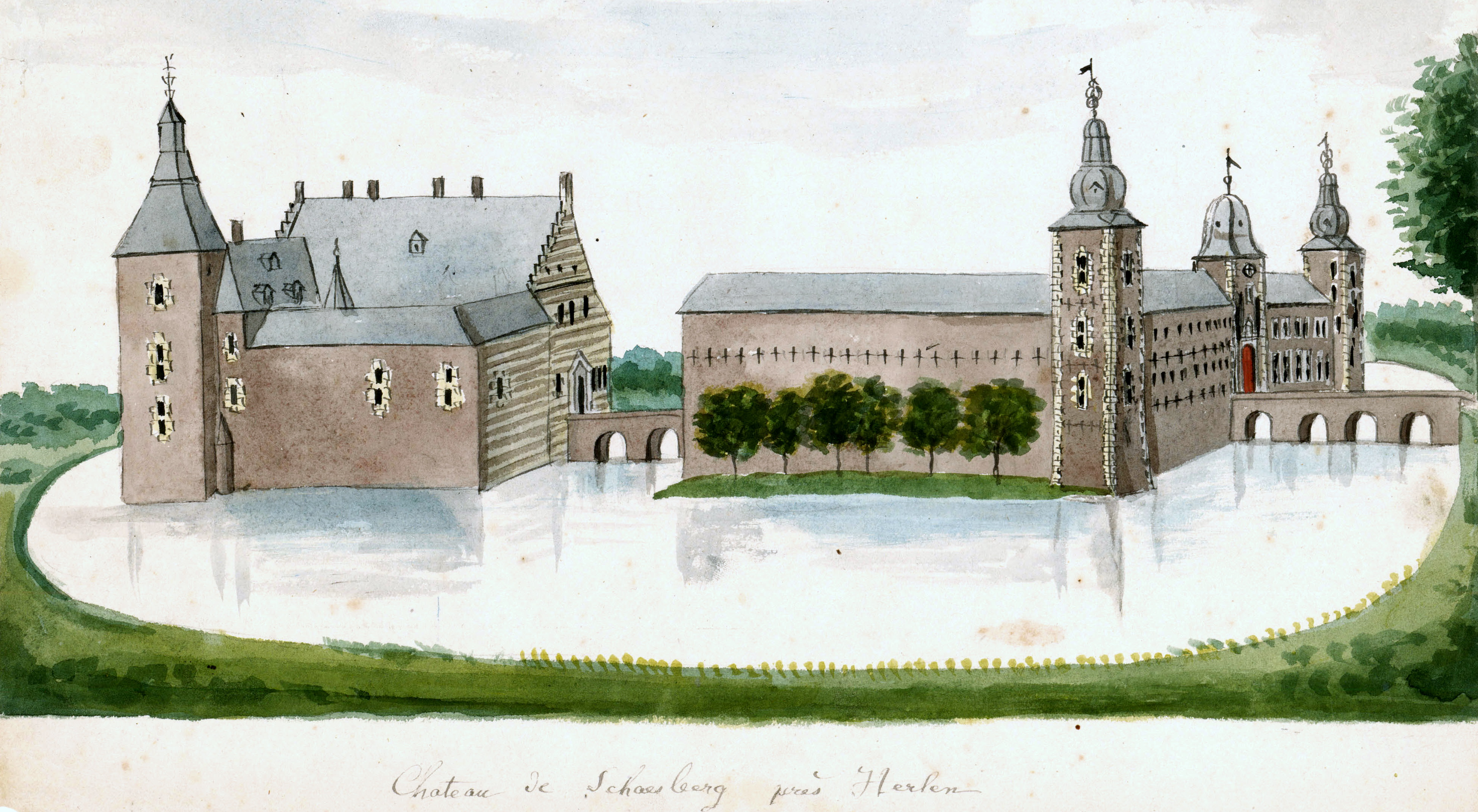 Ingekleurde tekening van Philippe van Gulpen van Kasteel Schaesberg bij Heerlen. Bijschrift: Château de Schaesberg près Herlen. Collectie Van der Noordaa in het RHCL, Maastricht, CVDN 250.